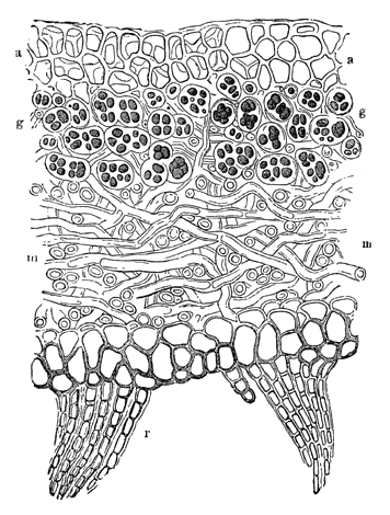 Durchschnitt durch den geschichteten Thallus einer Laubflechte (Sticta fuliginosa), 500fach vergrößert. aa – Rindenschicht, scheinbares Parenchym gg – Gonidienschicht (gonimische Schicht) mm – Markschicht rr – Hyphenbündel